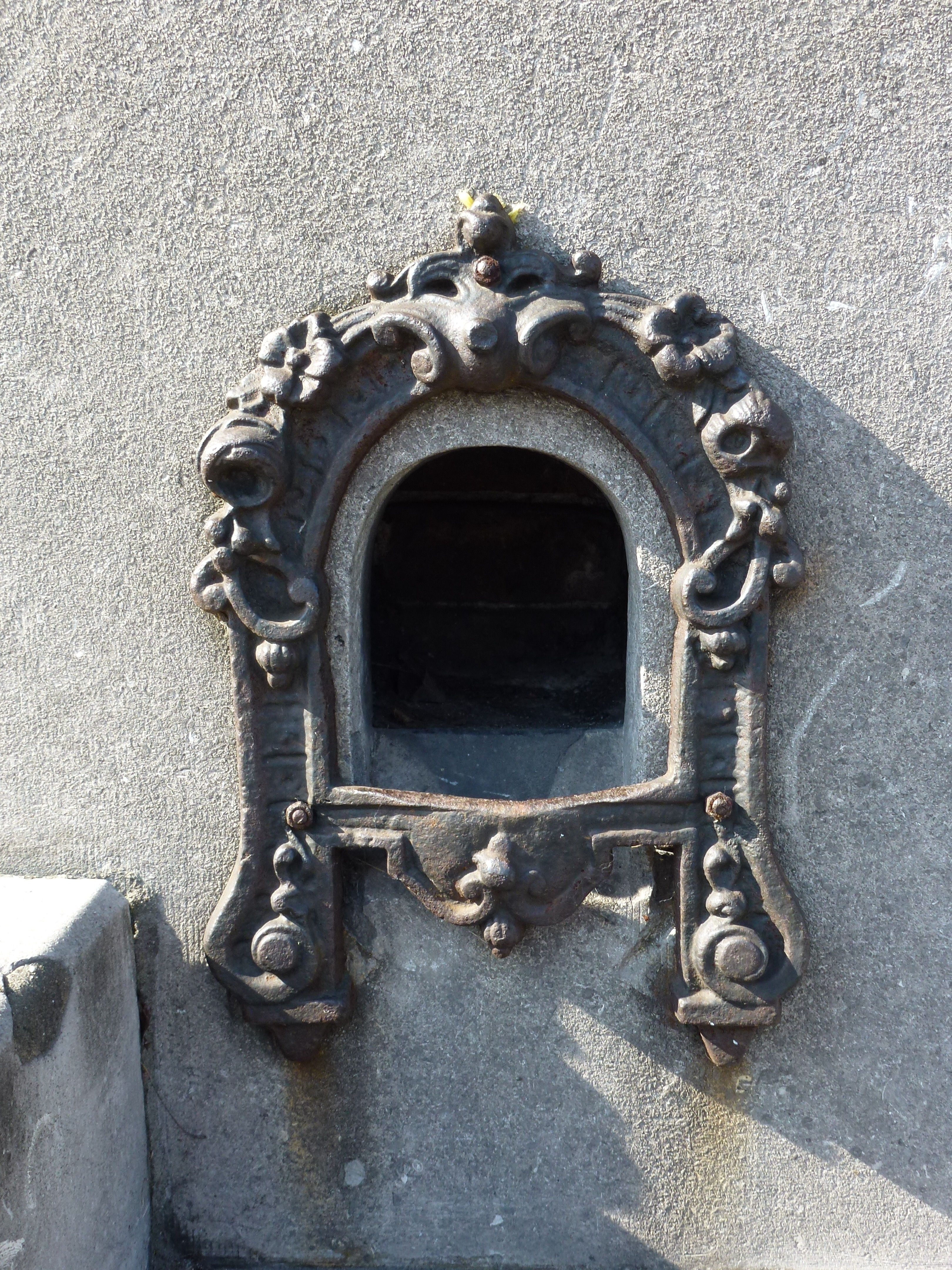 Schoenschraper uit 1886. Toen de wegen nog niet bestraat waren kon men hiermee de schoenen schoonschrapen. Het bevindt zich iets boven het straatniveau aan een huis Kattensingel 79, Gouda